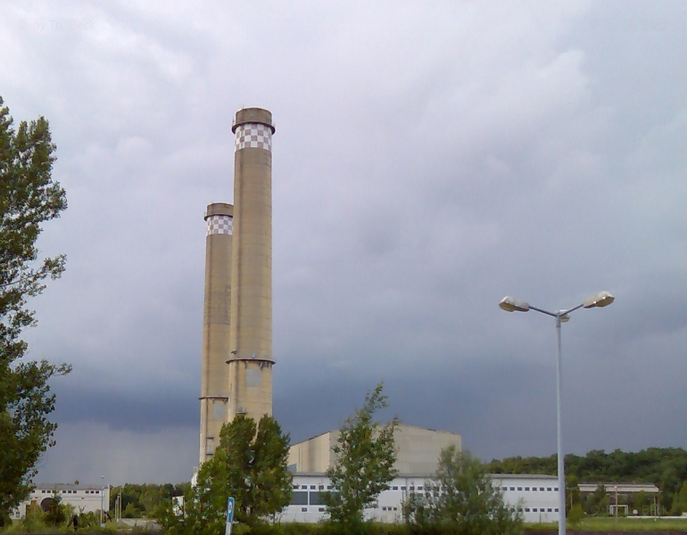 Ehemaliges Gasturbinenkraftwerk Zschornewitz (G24)